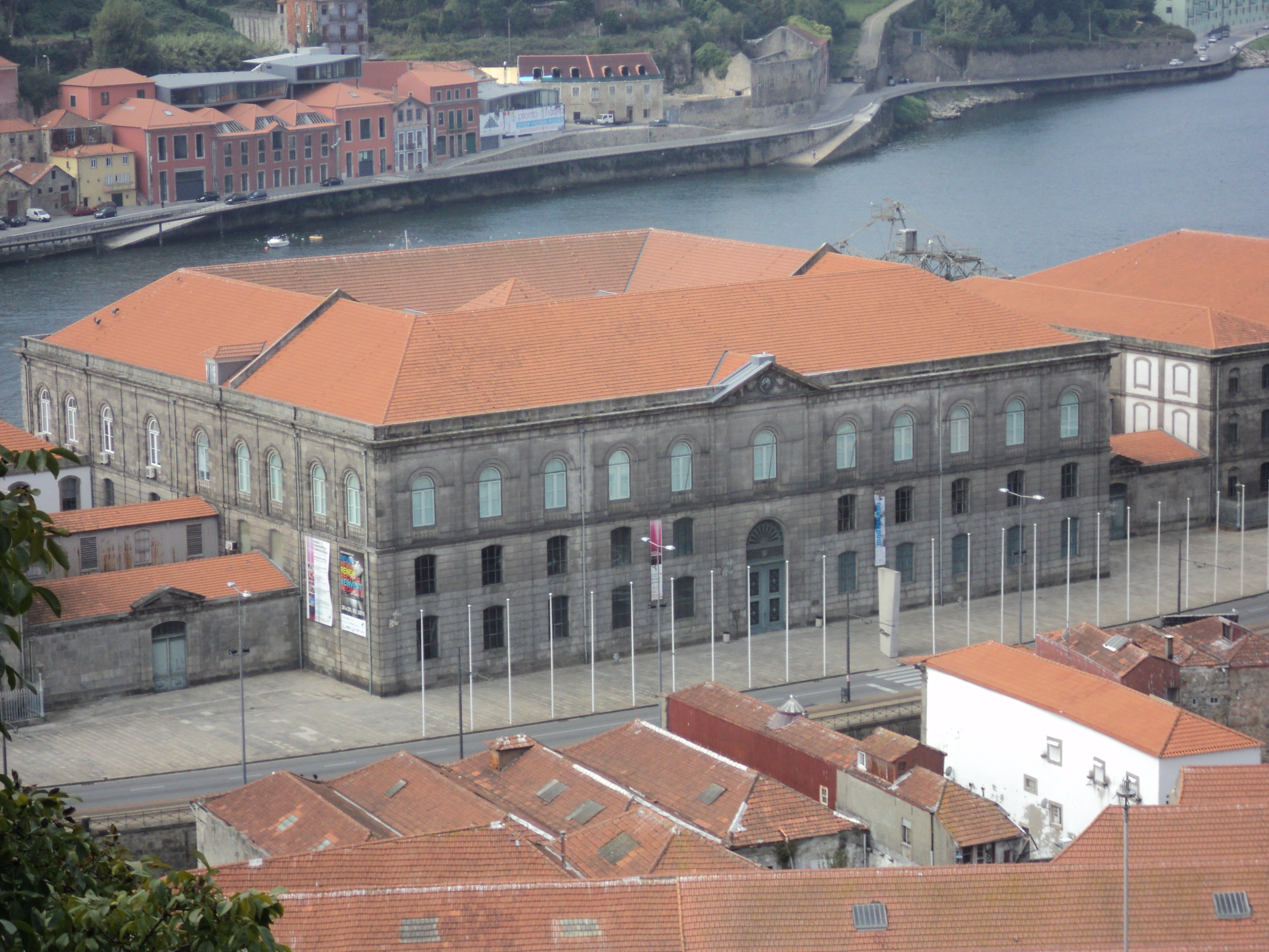 Alfândega Nova ou Alfândega Nova do Porto. Em Portugal, Porto, Porto, Miragaia. This file was uploaded for Wiki Loves Monuments in Portugal with the unique identifier 70765. This monument is classified as Em vias de classificação. This building is classified as Em vias de classificação.